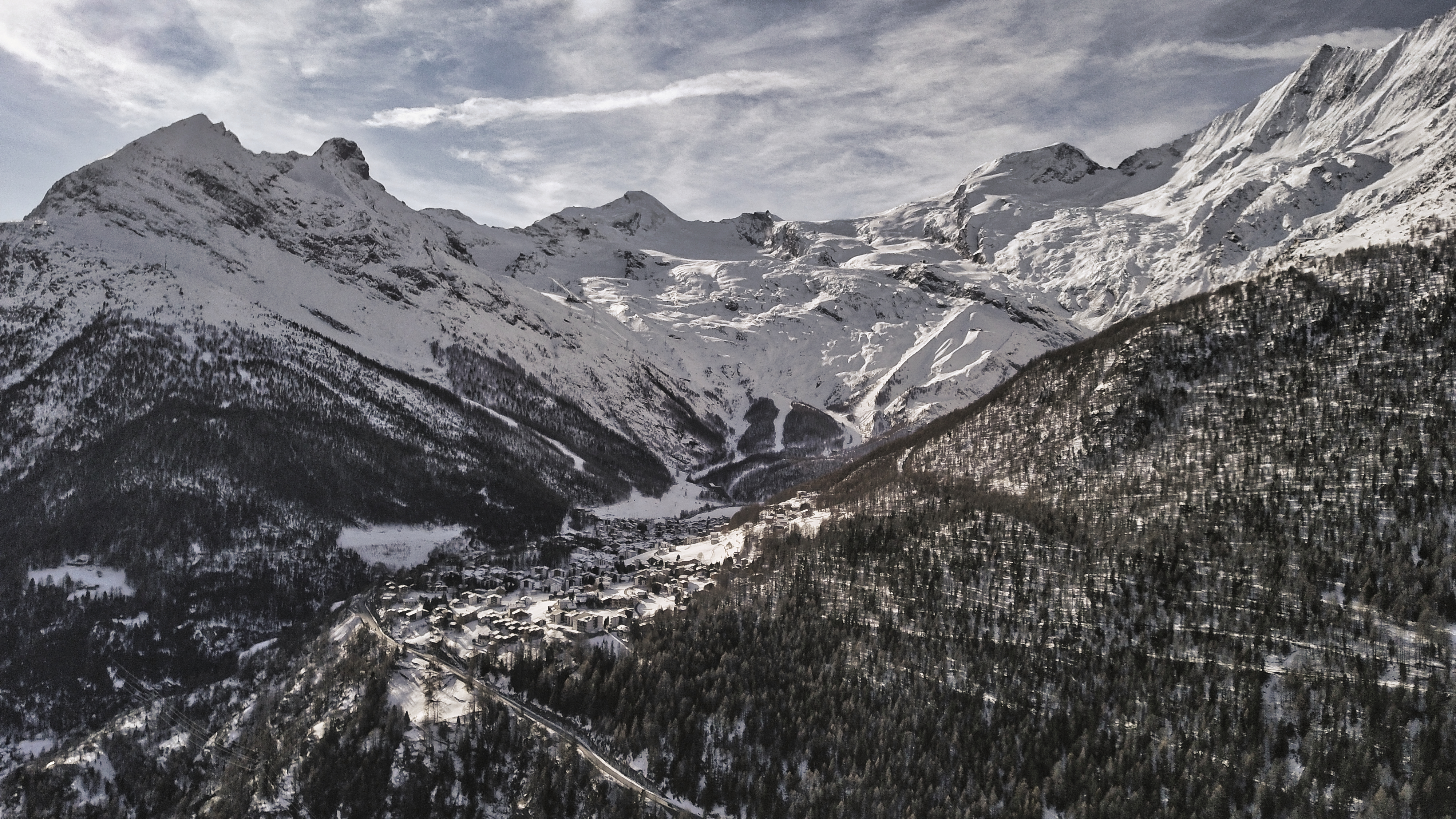 Saas-Fee von Saas-Grund aus fotografiert.